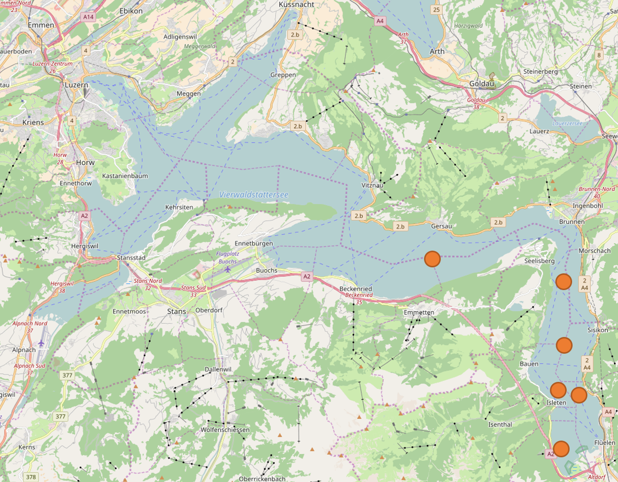 Orte der Munitionsversenkungen in Schweizer Seen im Vierwaldstättersee. Karte: OpenStreetMap.